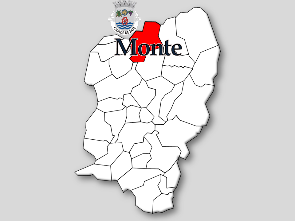 Censos 1864/2011